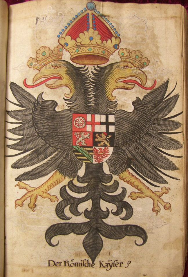 Um Zusätze vermehrte Abschrift von Sigmund Feyerabends Frankfurter Ausgabe (1578/1579) des Turnierbuchs von Georg Rüxner (Jörg Rugen), Handschrift auf Papier, 17. Jahrhundert. Detail: Reichsadler mit den Wappen der sieben Kurfürsten als Herzschild